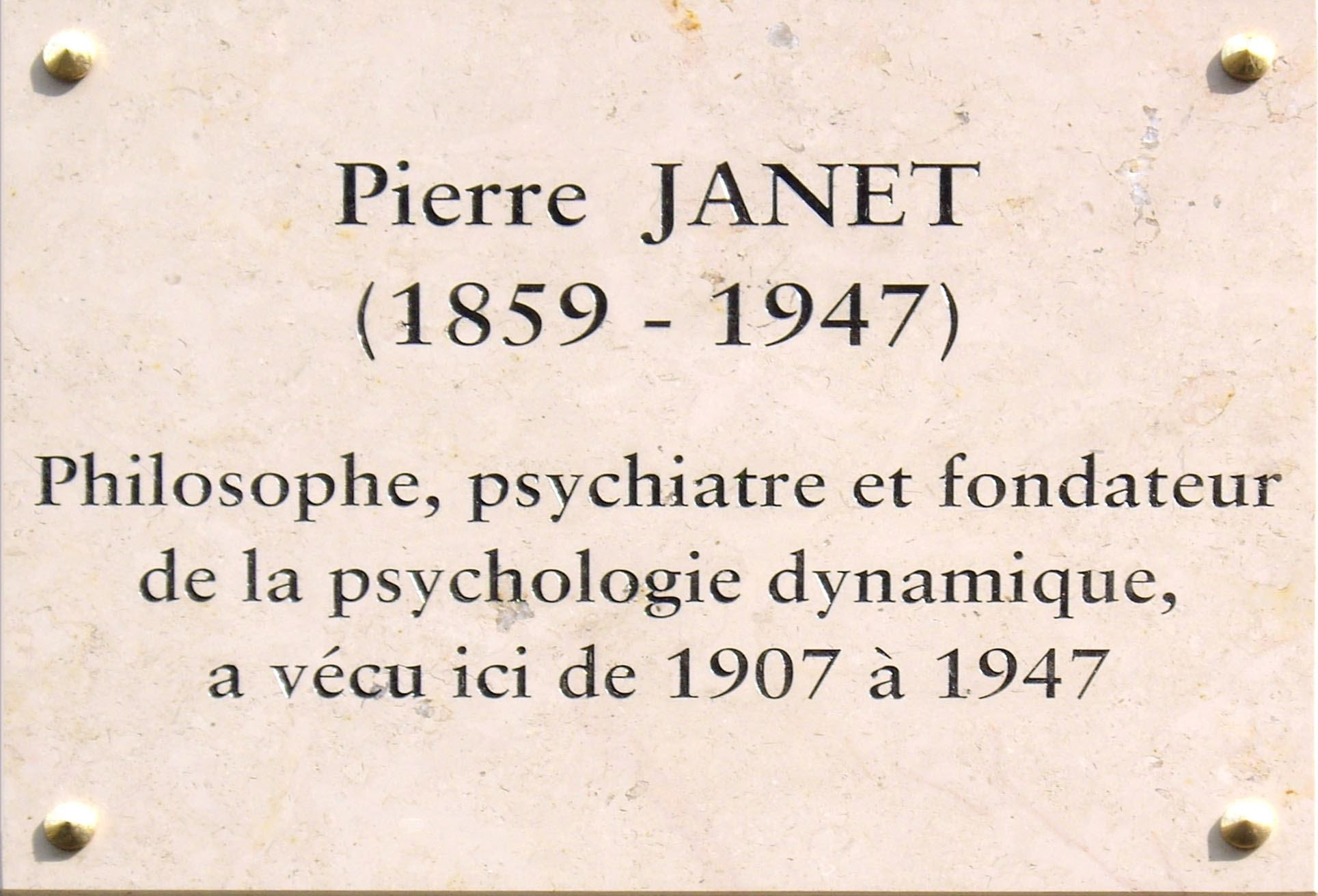 Plaque apposée au n° 54 de la rue de Varenne, Paris 7e, où habita le philosophe et psychologue Pierre Janet (1859-1947) de 1907 à 1947.